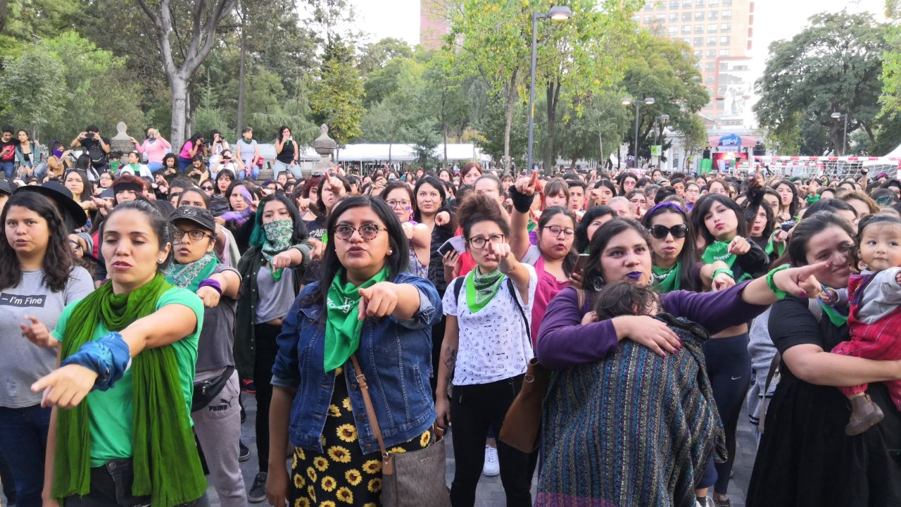 Mujeres ensayando el performance "Un violador en tu camino", Alameda Central, CDMX